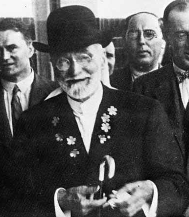 Ramón Pelayo de la Torriente, I marqués de Valdecilla, en agosto de 1929